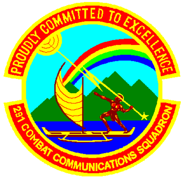 291 Combat Communications Squadron emblem